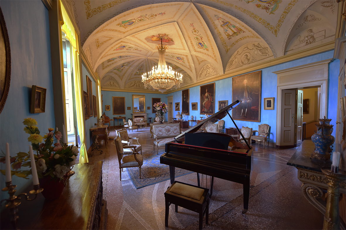 Interiore del castello di Roppolo Salotto azuro